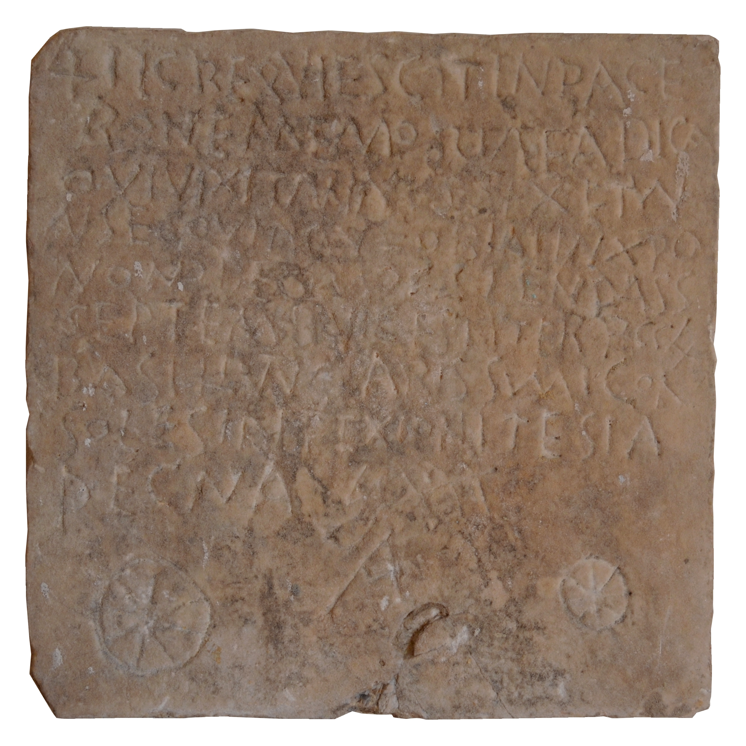 Épitaphe chrétienne provenant de Revel-Tourdan, Isère (France) portant l'inscription latine transcrite par CIL XII, 2187. Provient du jardin de la cure de Tourdan, trouvée sans doute avant 1865, puis encastrée à gauche de l'église de Tourdan, puis au moins depuis 2014 à l'intérieur, sur le mur droit de la nef proche de l'entrée.